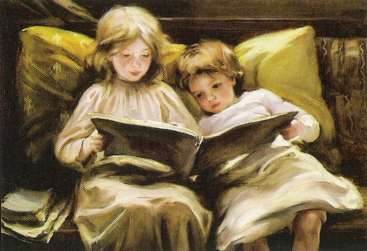 detail